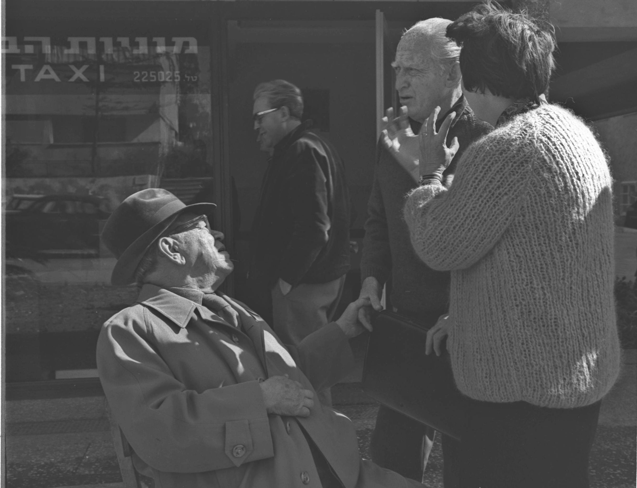 Yehoshua Bertonov with Habima actor Rafael Klatzkin and film producer and director Bella Baram during the filming of a scene of a film on his life. יהושע ברנטונוב ושחקן הבימה רפאל קלצקין עם מפיקת ובמאית הסרטים בלה ברעם בזמן צילומי הסצינה בסרט על חייו.